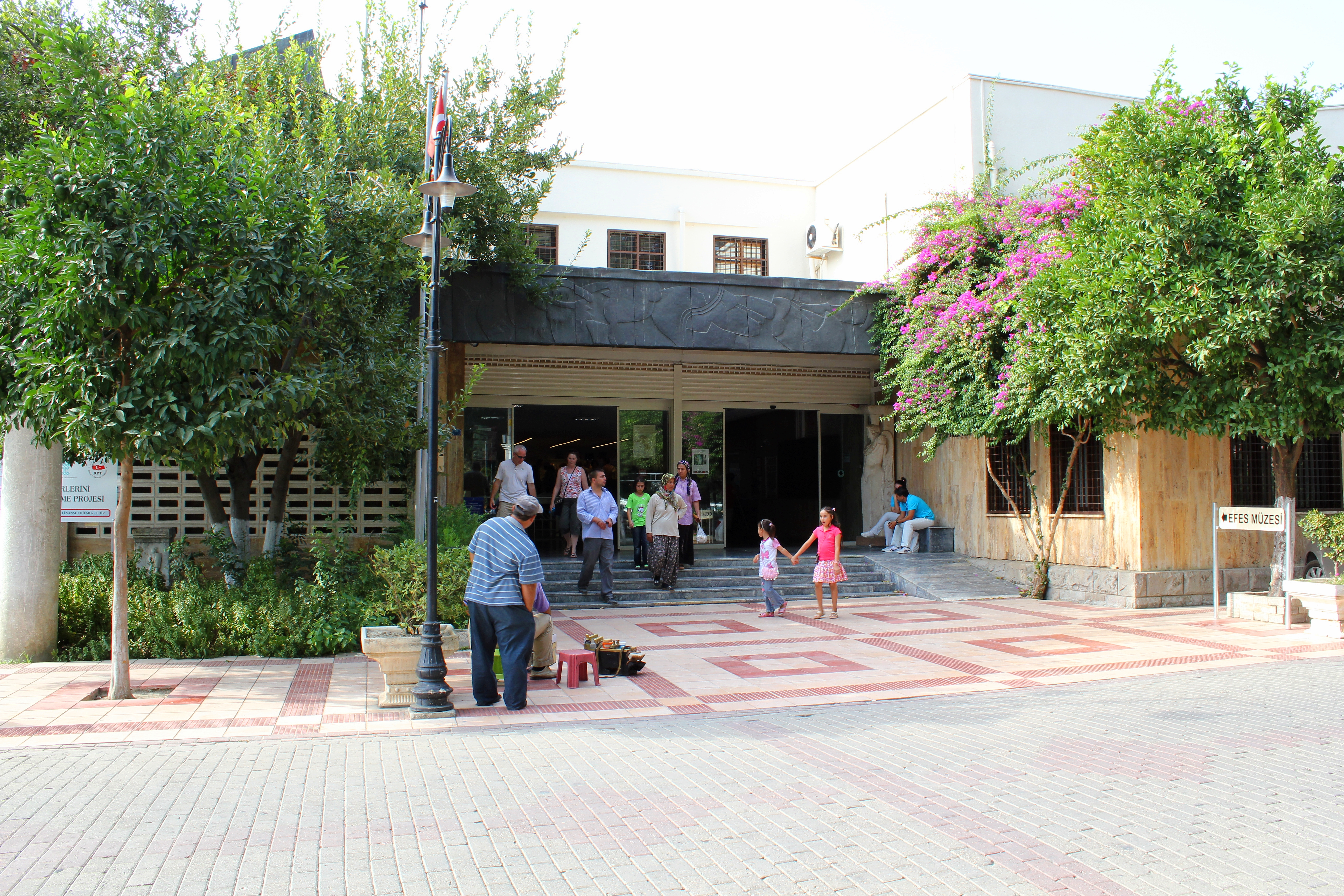 Ephesus-Museum Selçuk, Westtürkei, Eingang